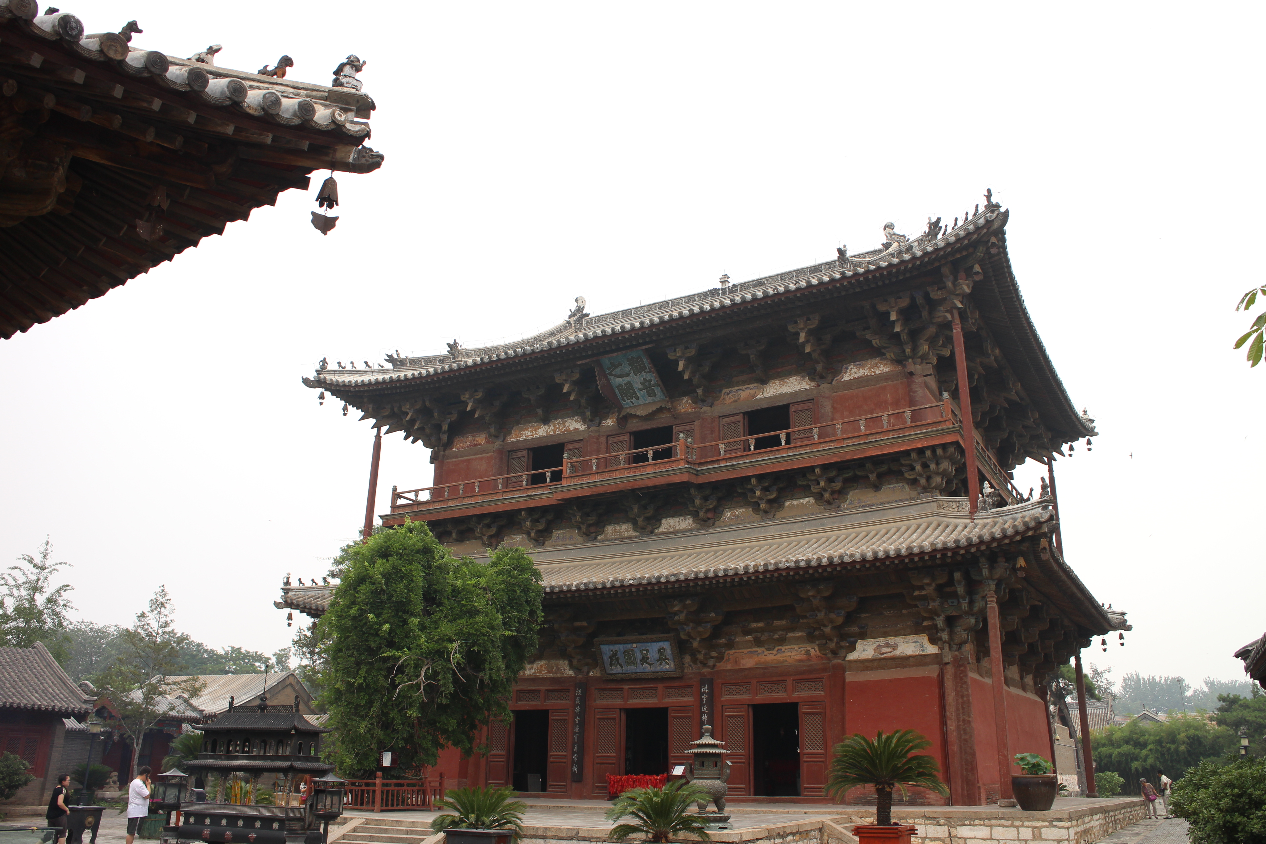 独乐寺观音阁